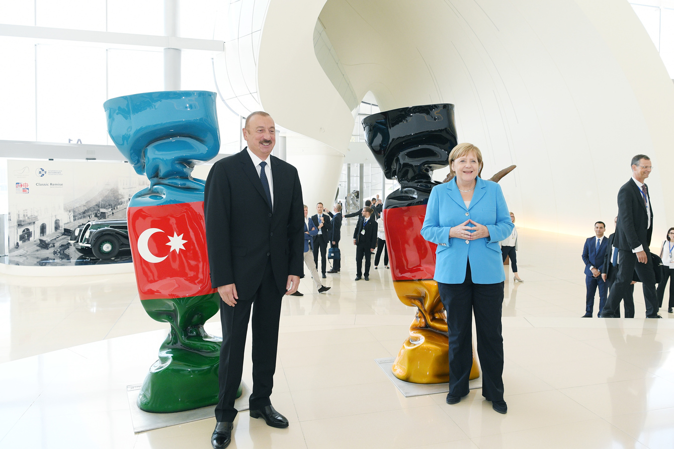 В Центре Гейдара Алиева состоялась встреча Президента Азербайджанской Республики Ильхама Алиева и Федерального канцлера Федеративной Республики Германия Ангелы Меркель с бизнесменами.